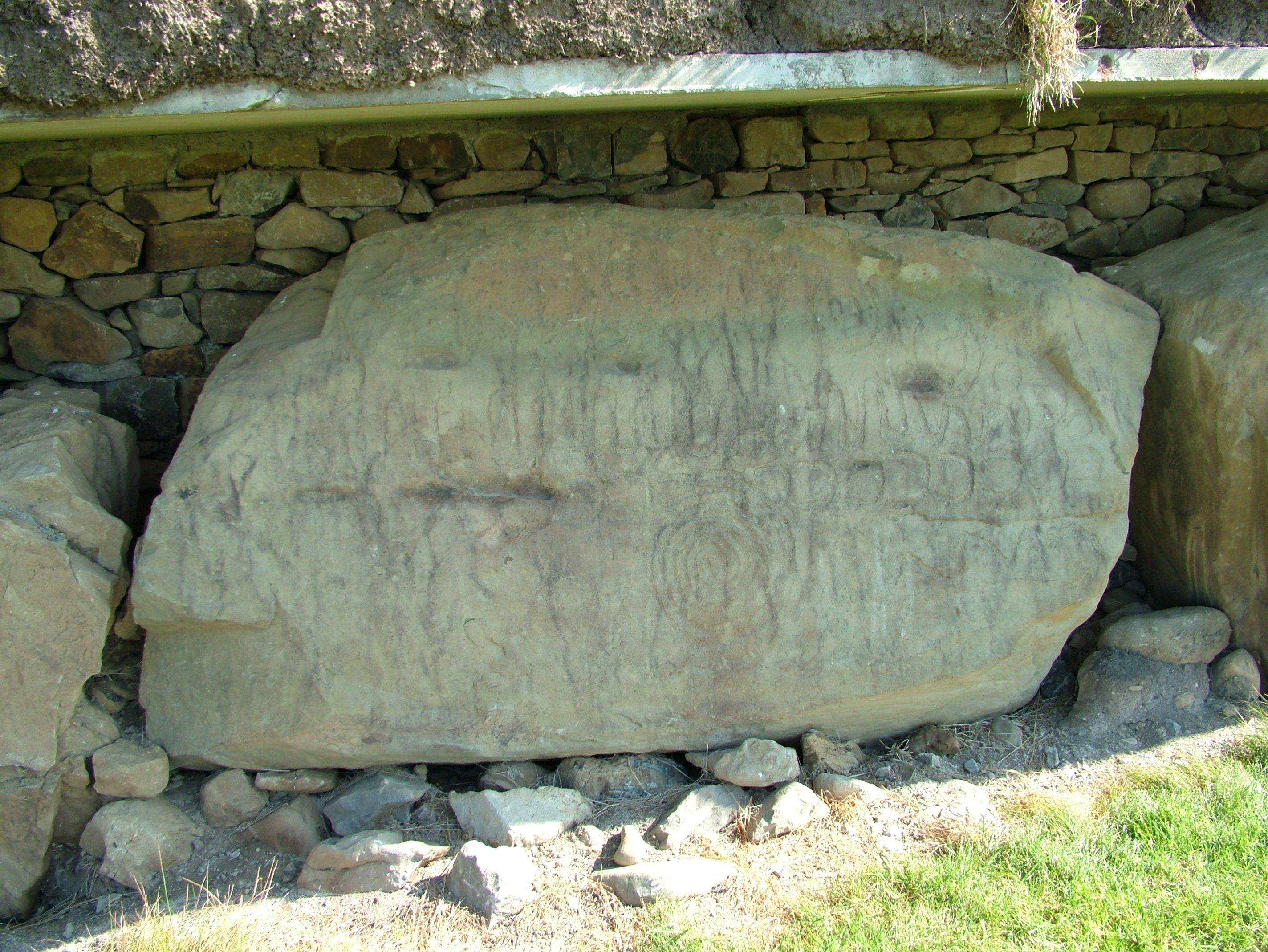 Knowth, Ireland, Stein am Hauptgrab